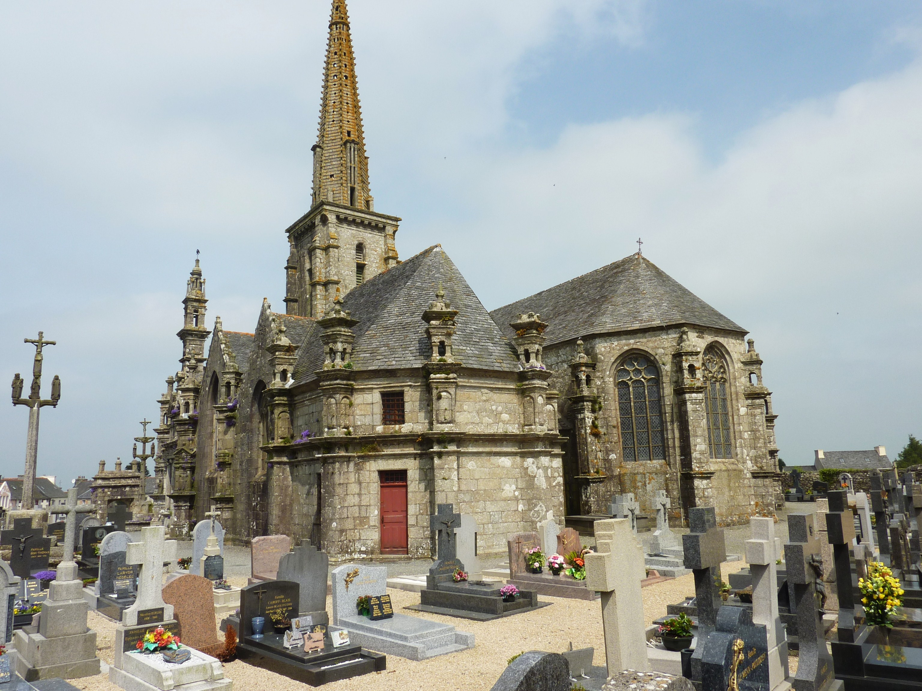 Commana L'église Saint-Derrien vue du cimetière